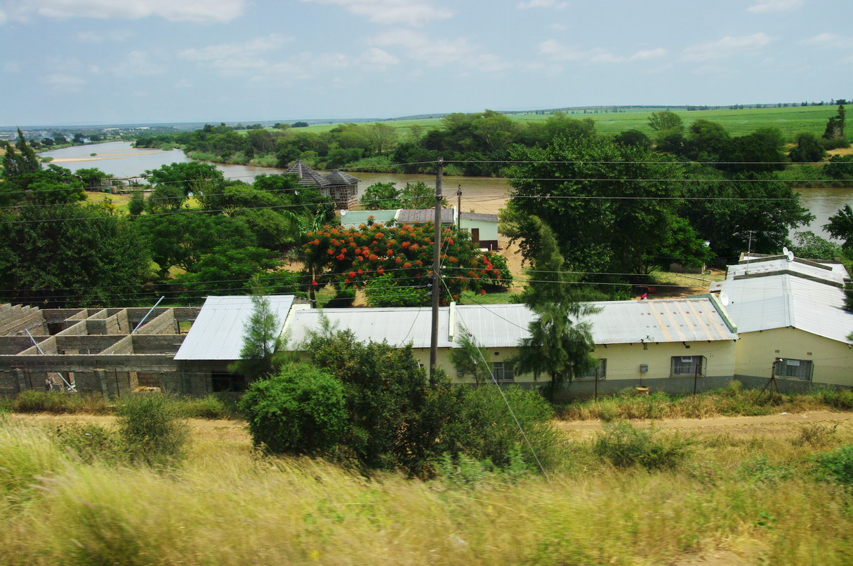 Dorf im Lowveld, Swaziland